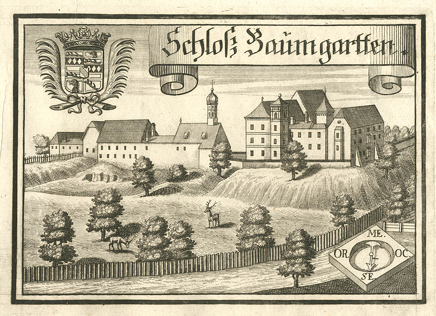 “Schloß Baumgartten” der Grafen Arco auf Valley (Baumgarten, Dietersburg), aus : Beschreibung des Churfürsten- u. Hertzogthumbs Ober- und Nidern Bayrn. Rentamt Landshut. – Gericht Pfarrkirchen, 1723